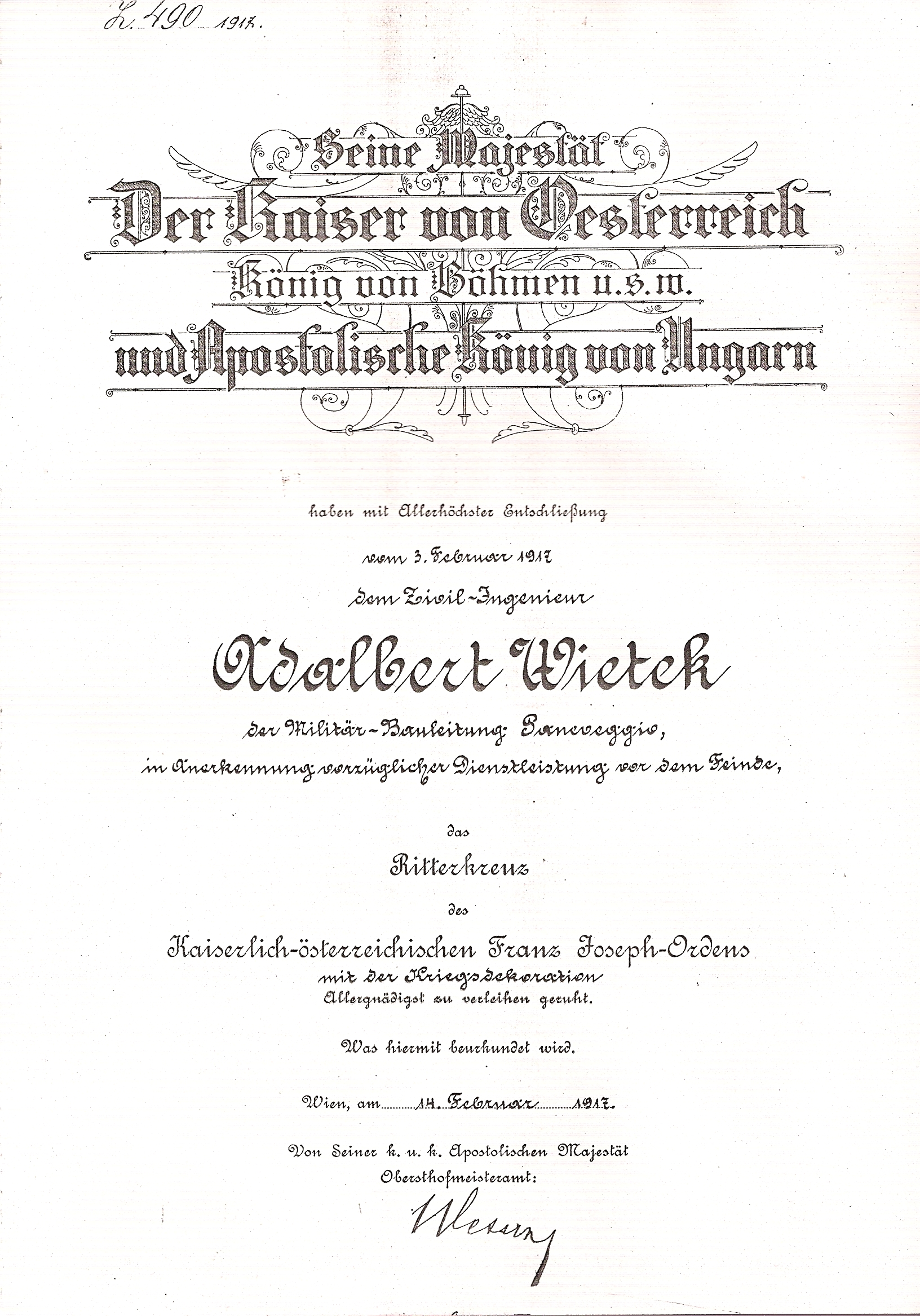 Ritterkreuz des Franz Josephs Ordens